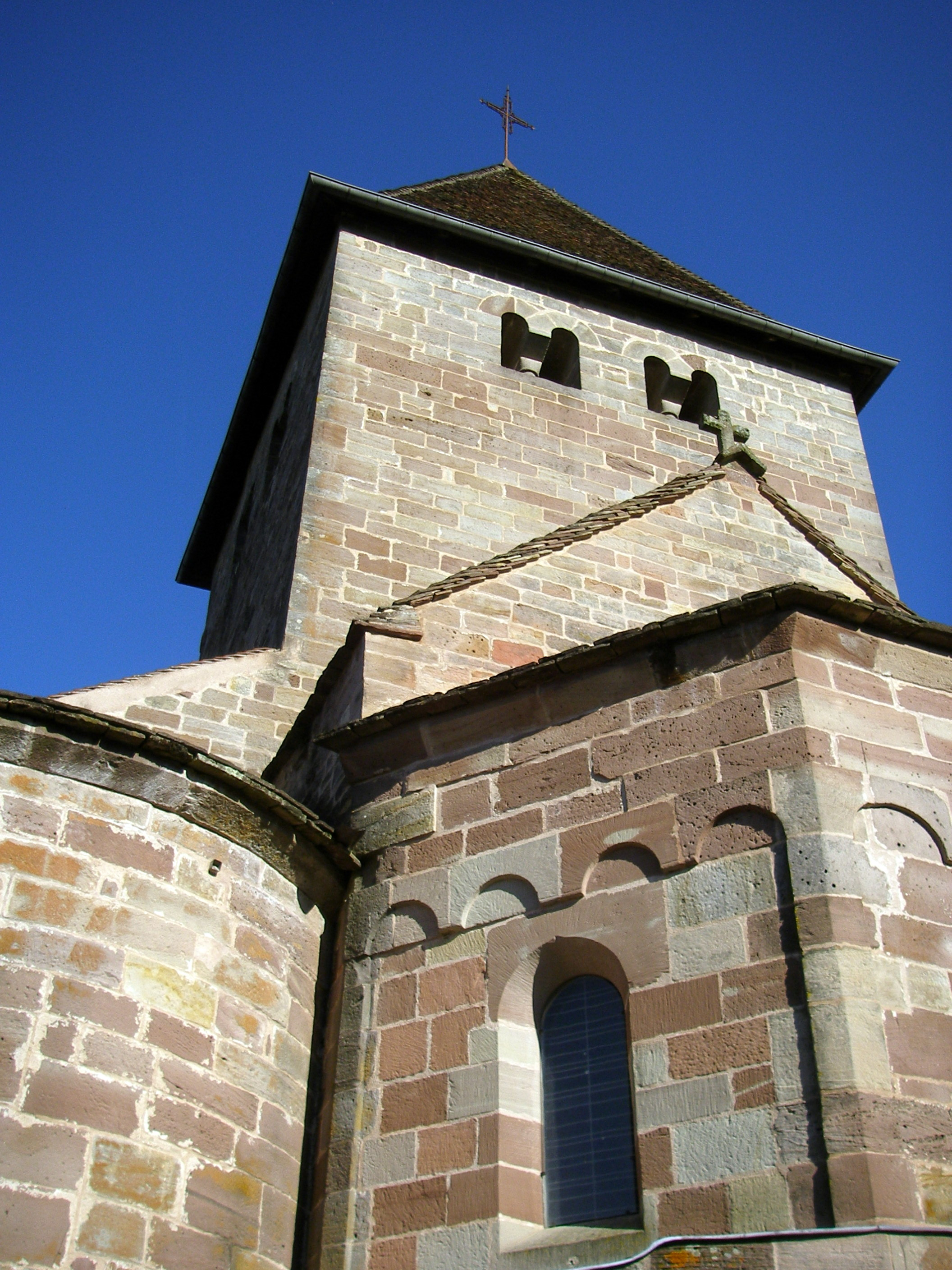 Choeur roman de l'église Saints-Pierre-et-Paul à Melisey (Haute-Saône, France)